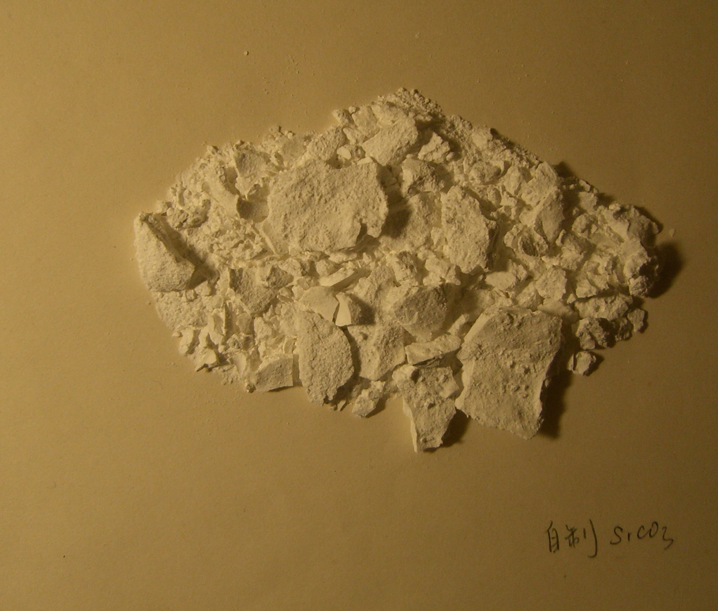 Strontium carbonate (unpurified)